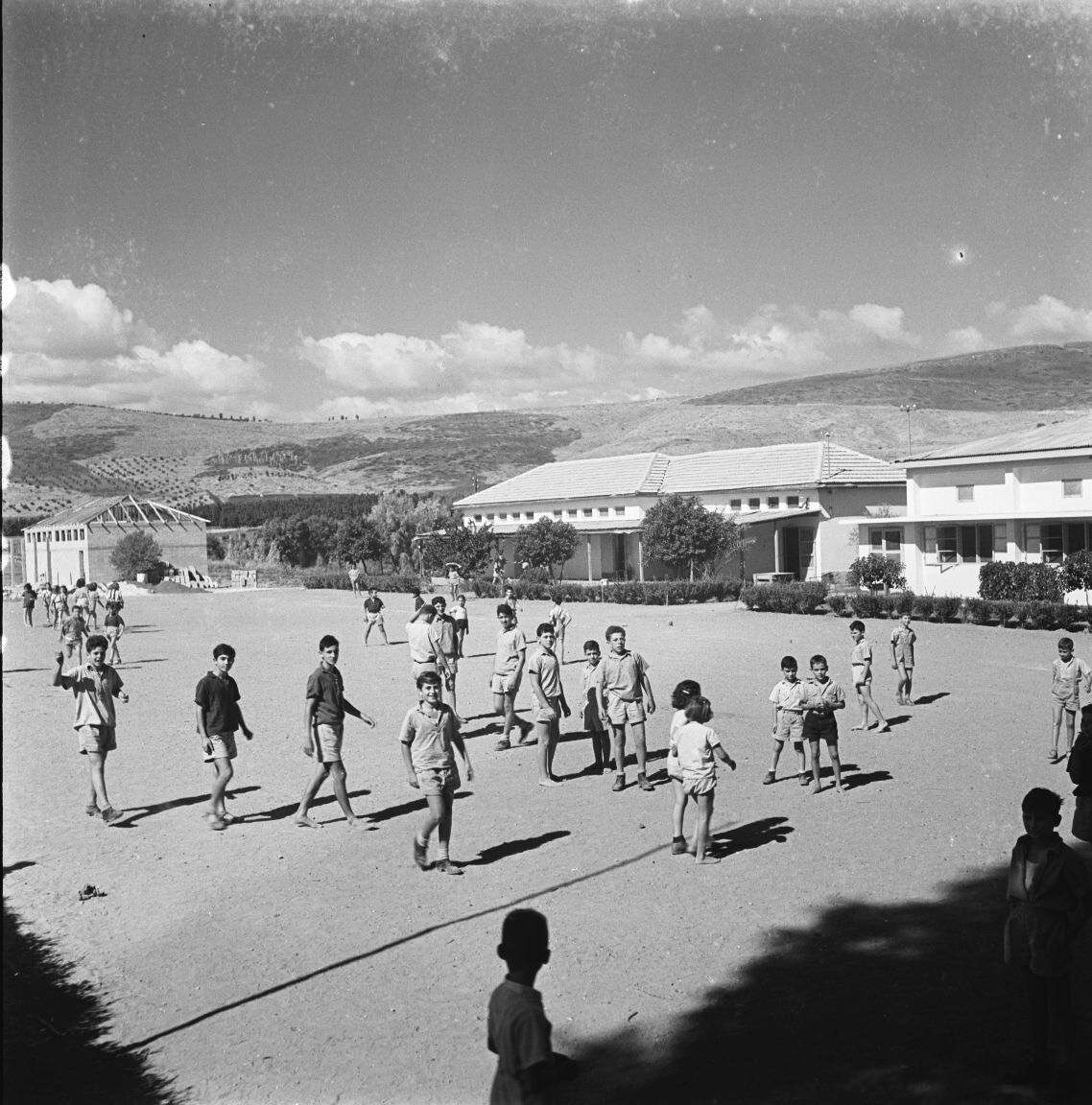 אוסף צילומים של הצלם זולטן קלוגר טווח מספרי התשלילים 25603 - 25798: 25 שנה לדגניה ב - תלמידי בית הספר